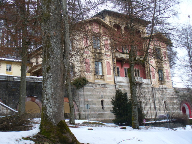 Koenigliche Villa, Berchtesgaden (Royal Villa, Berchtesgaden)